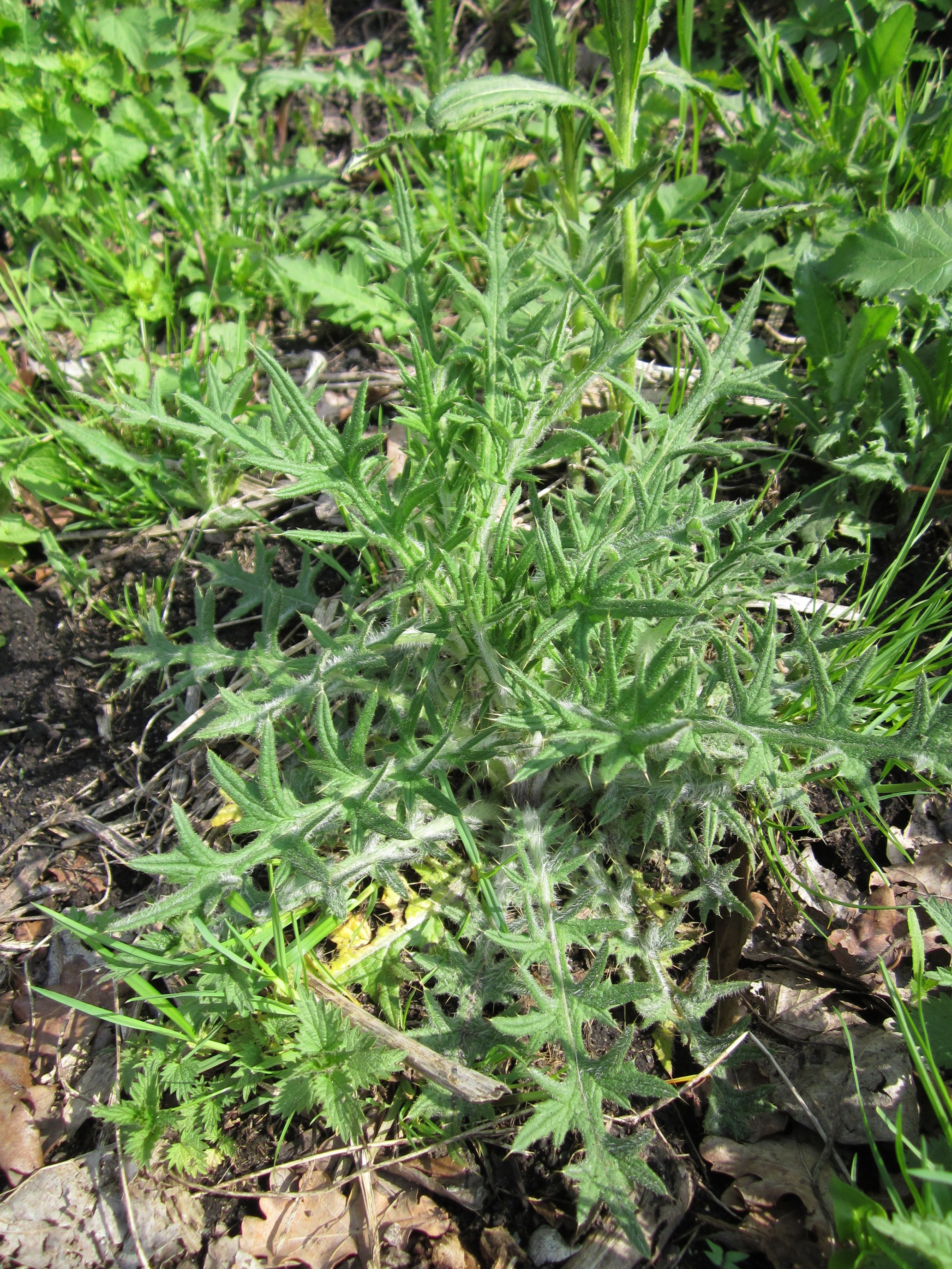 Weg-Distel (Carduus acanthoides) im Hockenheimer Rheinbogen